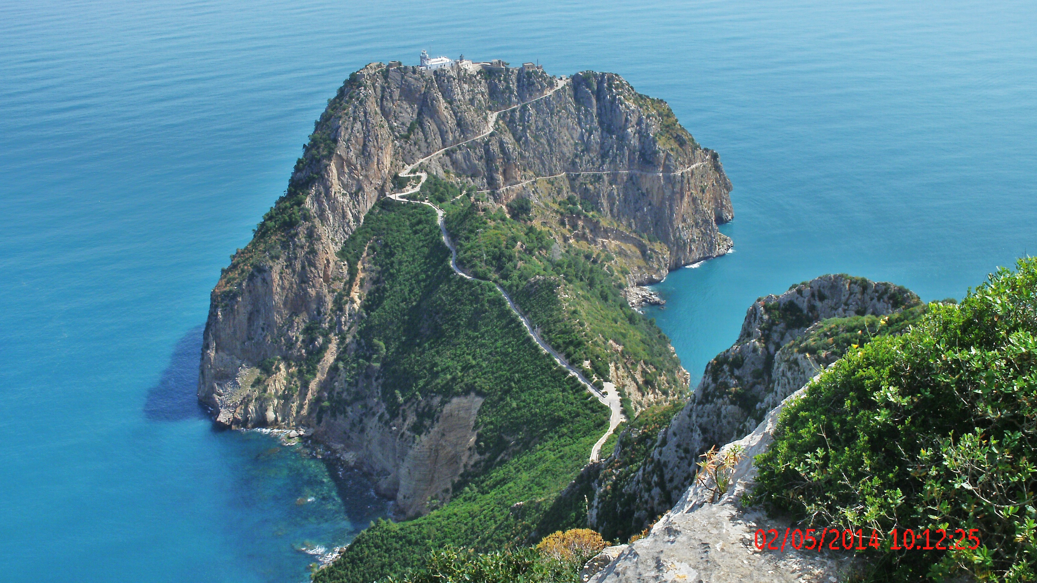 Le phare du Cap Carbon à Béjaïa